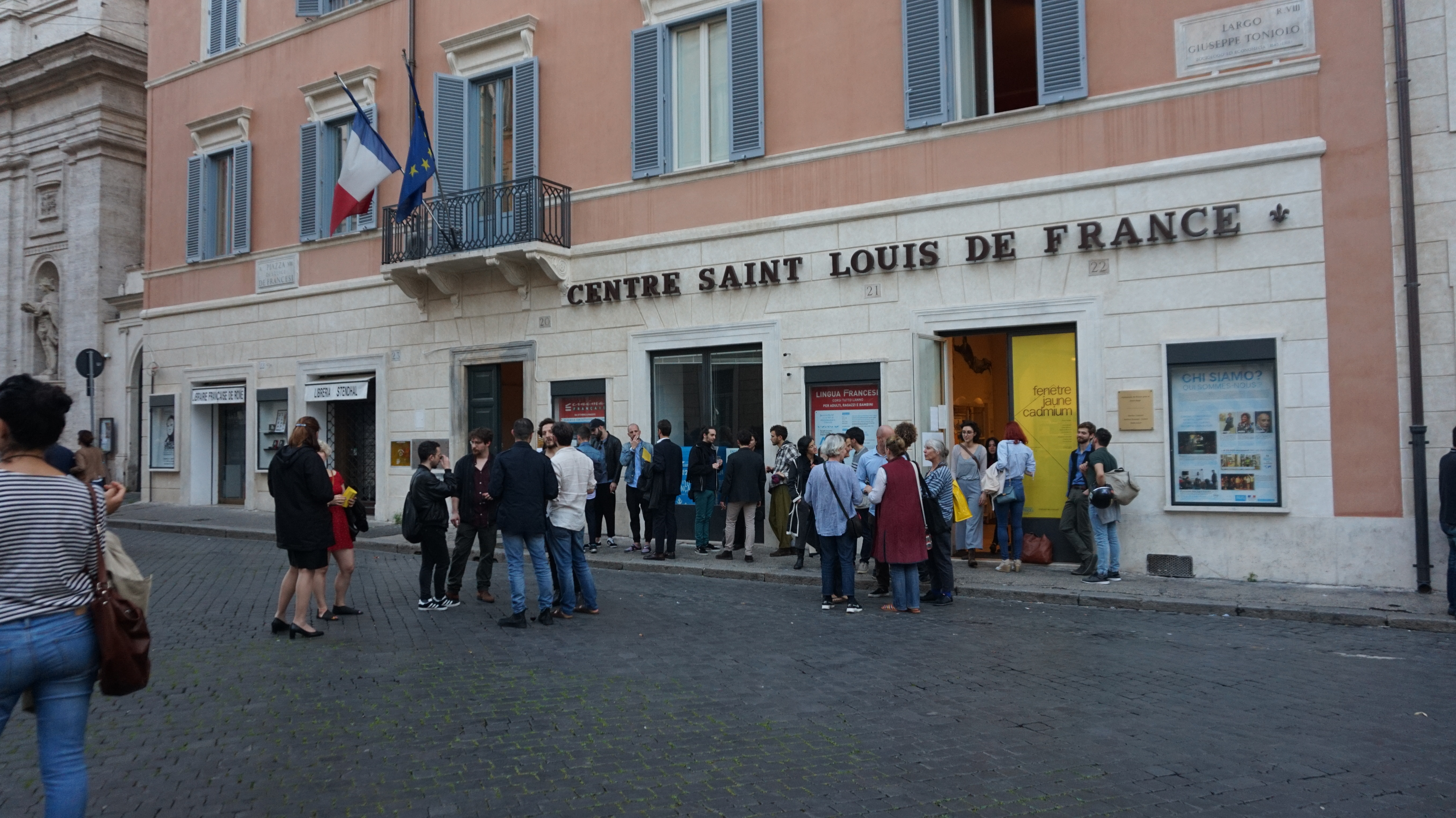 Entrée de l'institut français - Centre Saint-Louis à Rome